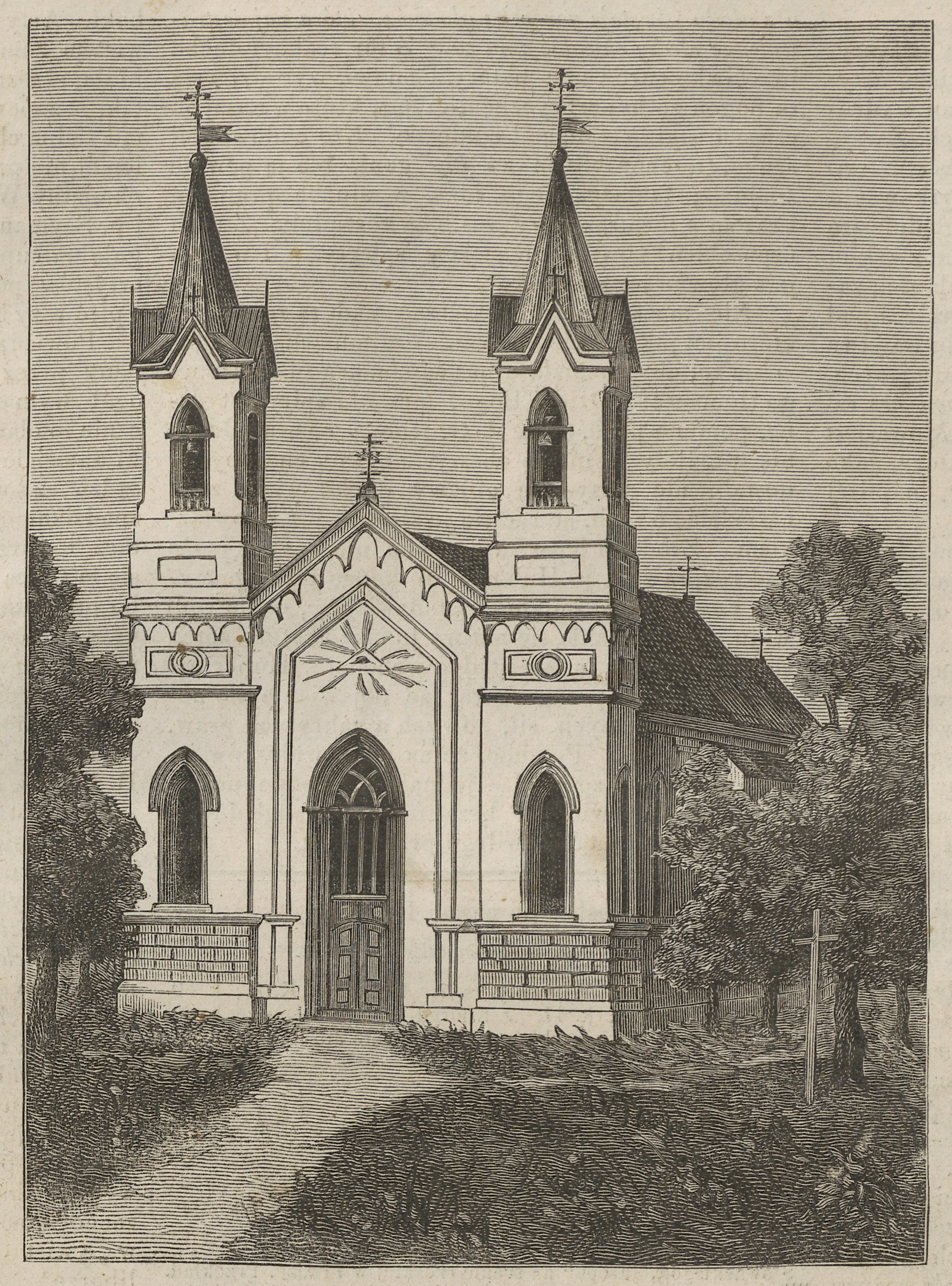 Беларуская (тарашкевіца): Новы Двор (Novy Dvor). Новы касьцёл